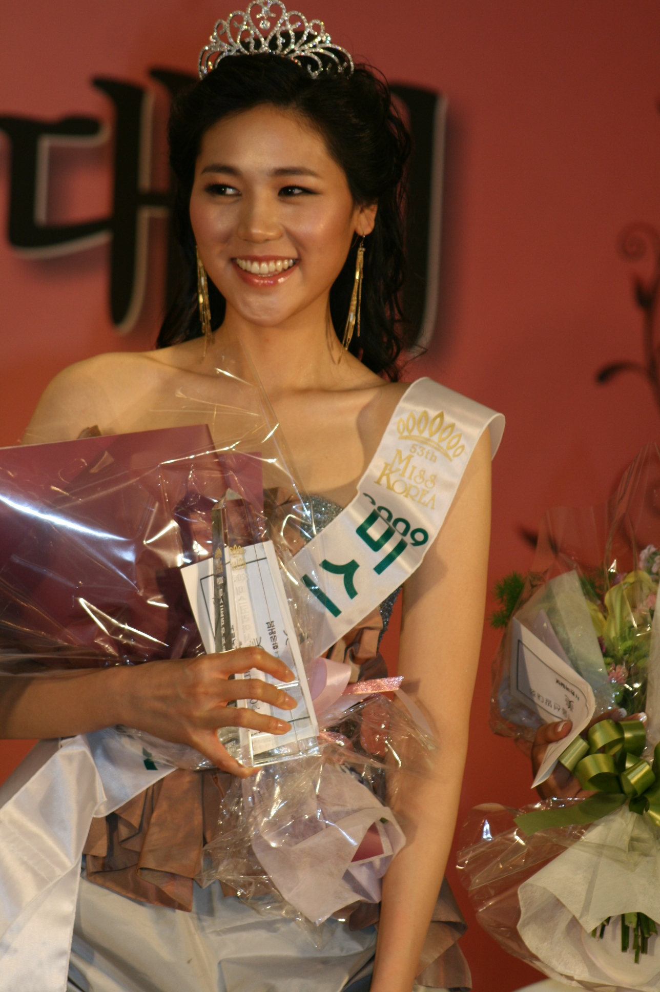 2009 미스코리아 서울 미 이윤경